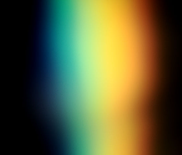 Спектр солнечного света после преломления в треугольной призме